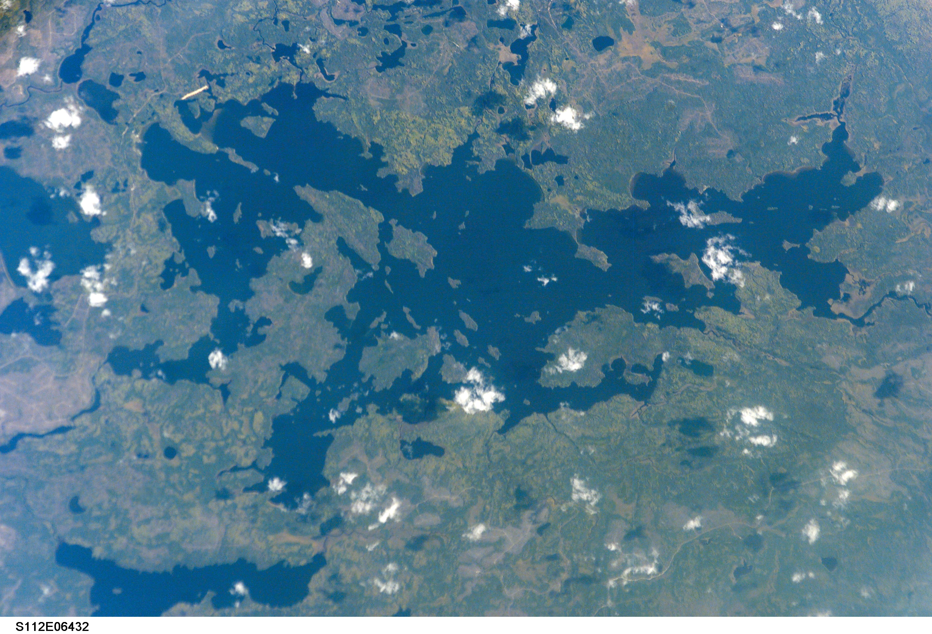 Kabinakagami Lake in Algoma District, Ontario, Canada. Center Points Latitude: 49.0 Longitude: -84.5